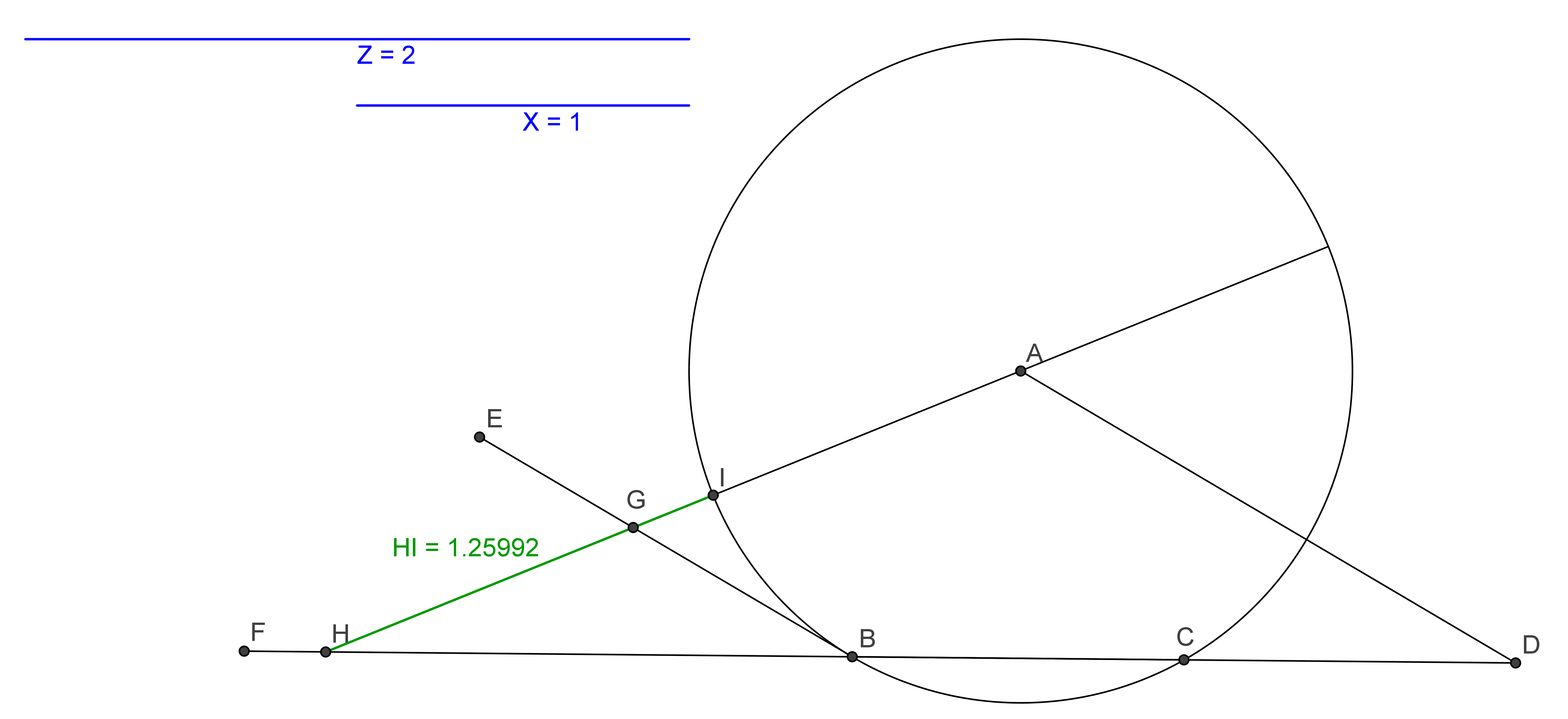 Duplicació del cub